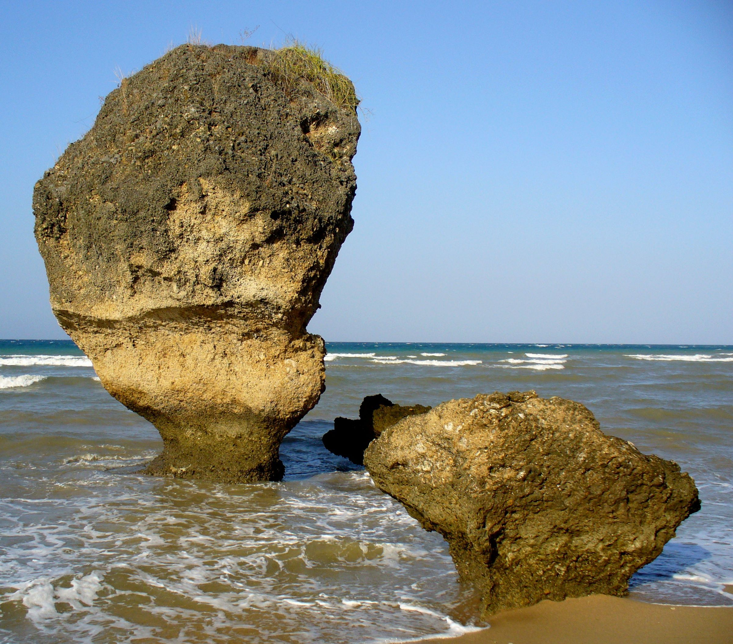 Pantai Wataboo, Osolata, East Timor